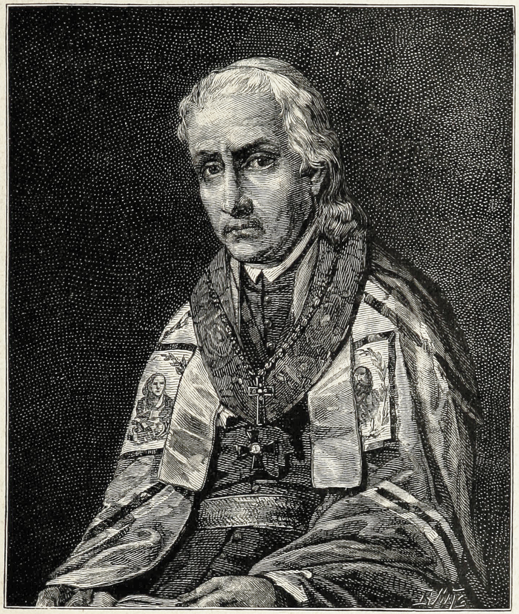 Беларуская (тарашкевіца): Партрэт Язафата Булгака (Jazafat Bułhak)